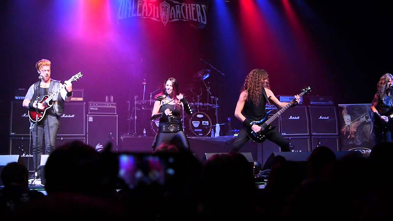 le groupe Unleash The Archers